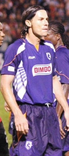 18-10-2006. Víctor Cordero jugando el clásico frente a Alajuelense en el Estadio Alejandro Morera Soto.